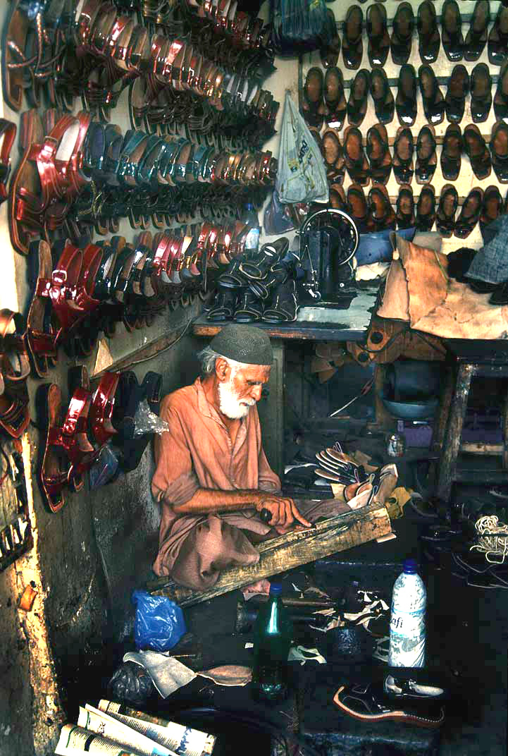 Ein Schuhmacher in Karatschi (Pakistan) in seiner Werkstatt. Versuch von AM.